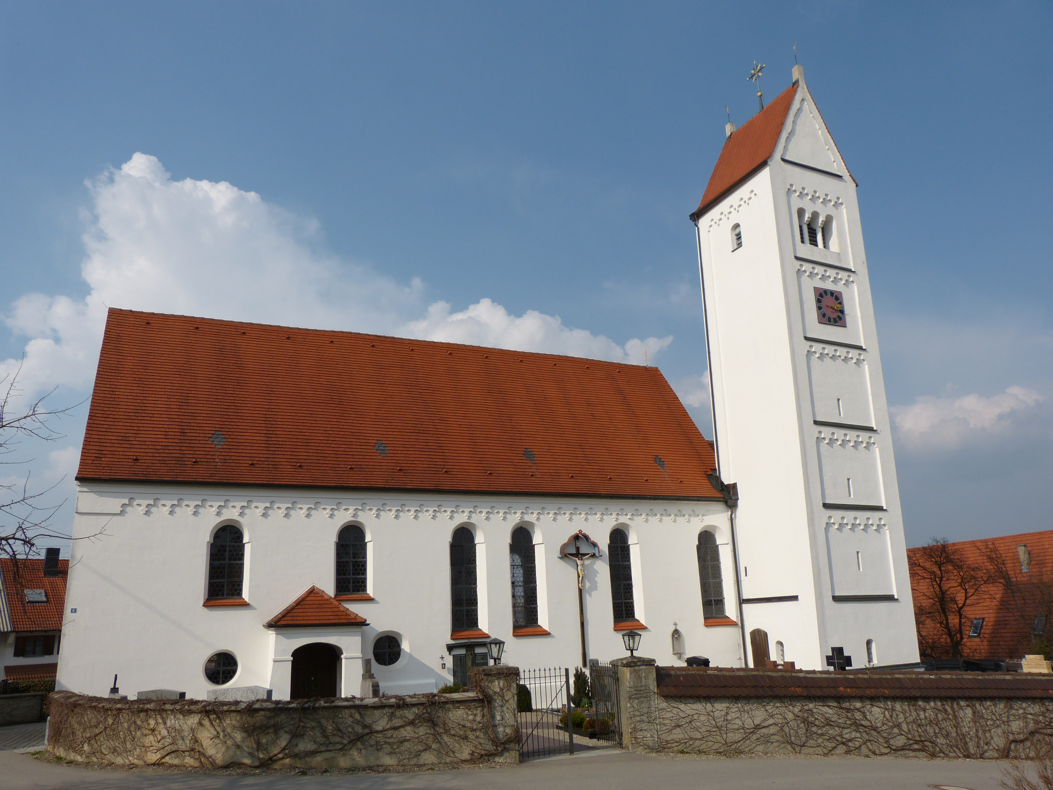 St. Gordian und Epimachus, Frechenrieden, Gemeinde Markt Rettenbach, Landkreis Unterallgäu, Bayern